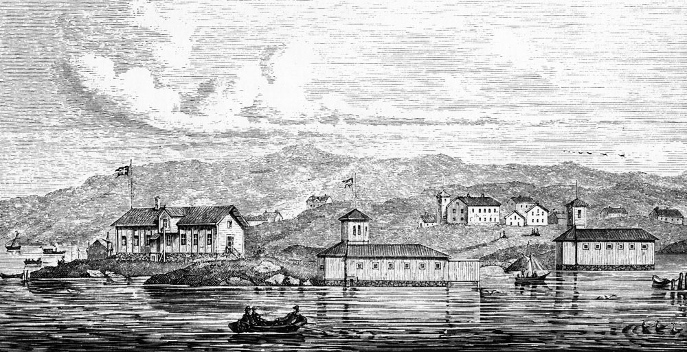 Långedrag